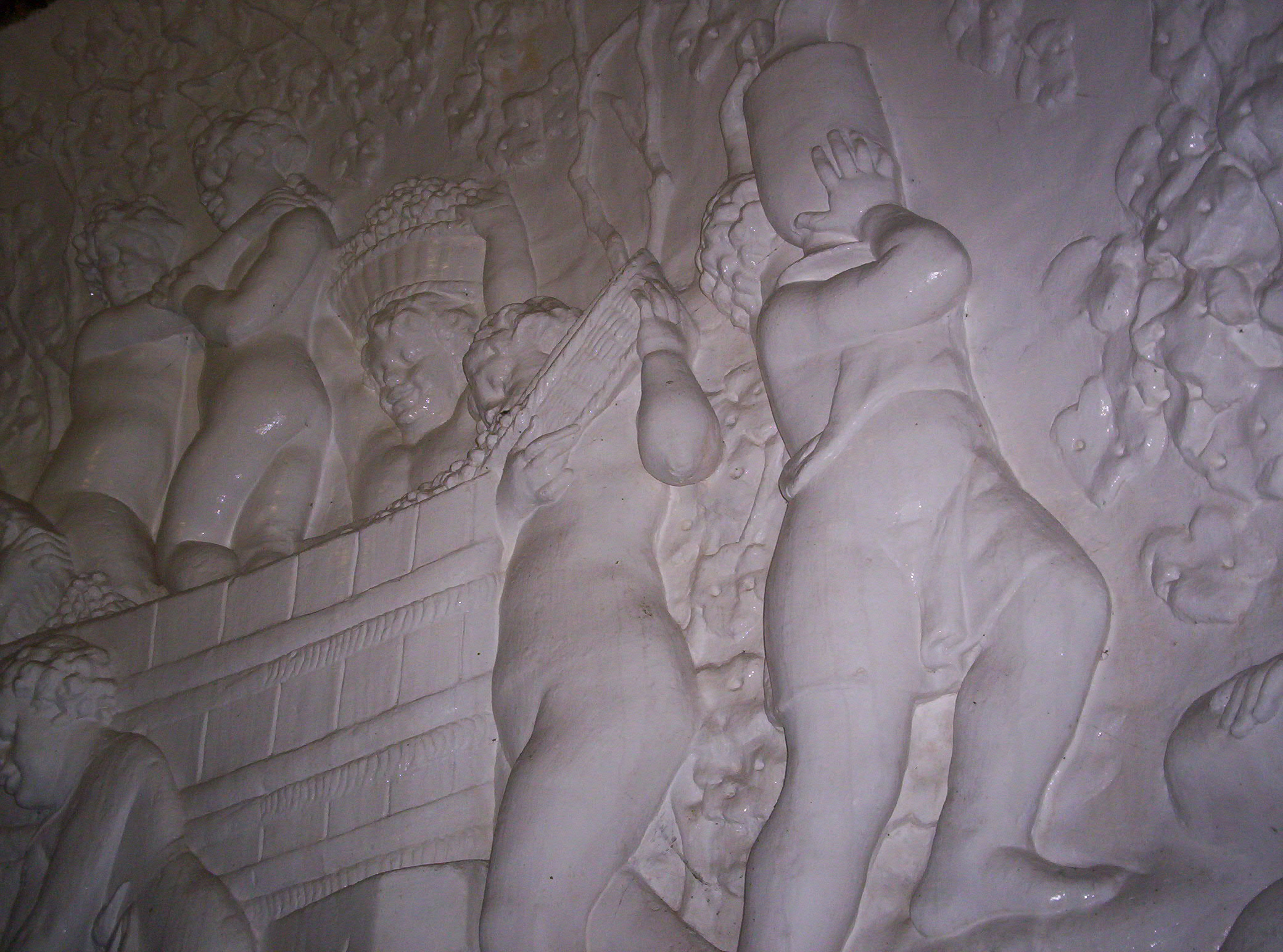 Visite des Caves Mercier à Épernay (Marne, France), bas relief par Gustave Navlet.